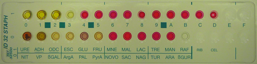 Galerie Id Staph après incubation et addition des réactifs